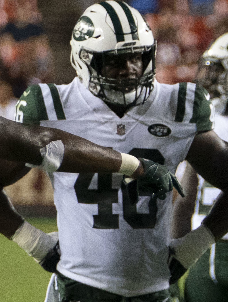 Jets at Redskins 8/16/18